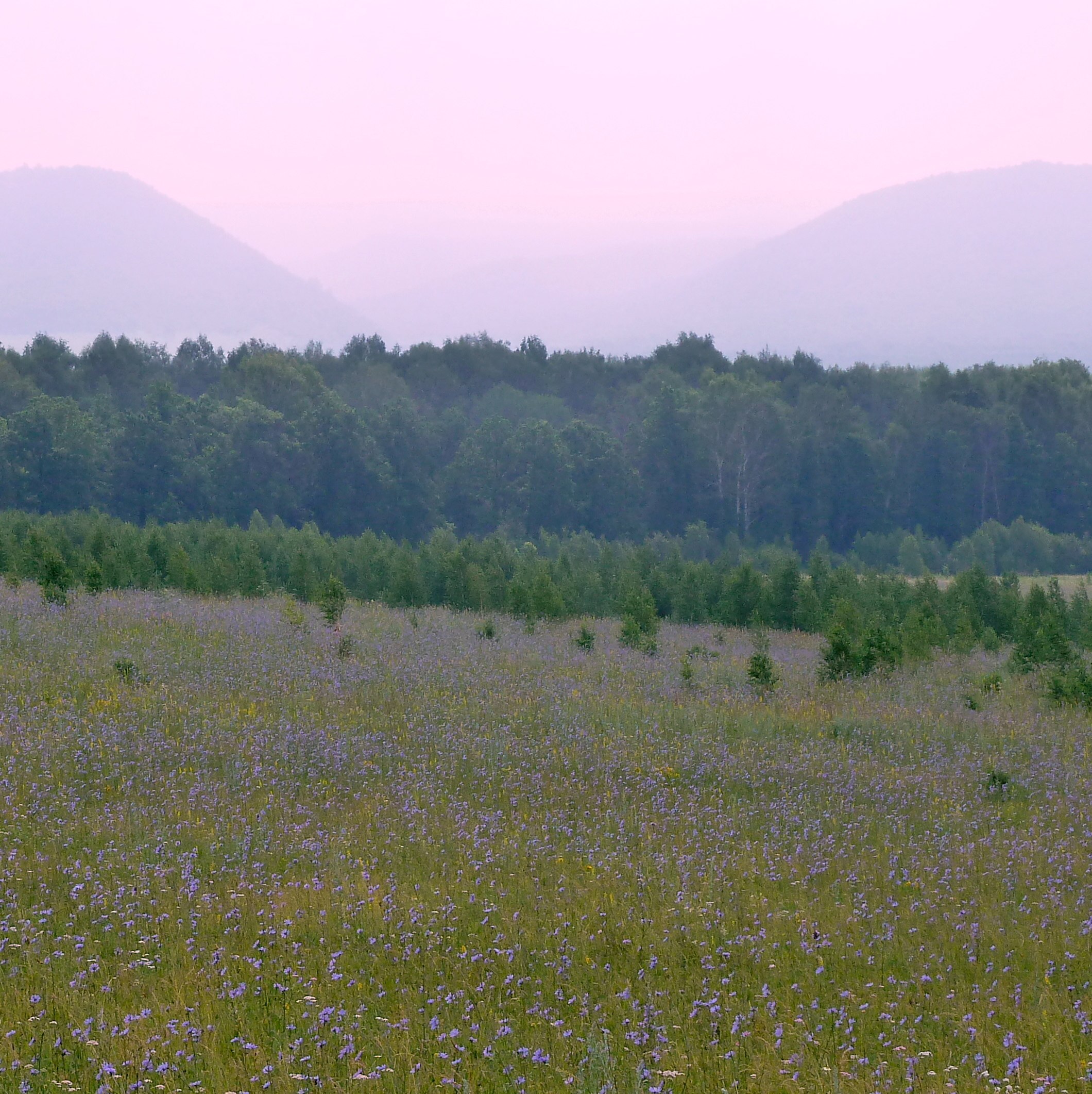 Заря. Архангельский район, Республика Башкортостан